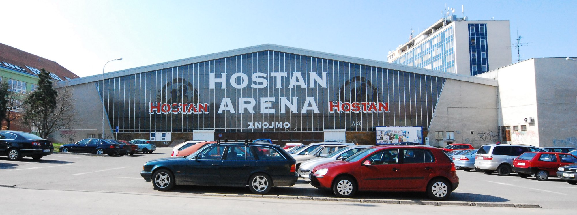 Die Sporthalle Hostan-Arena in Znojmo